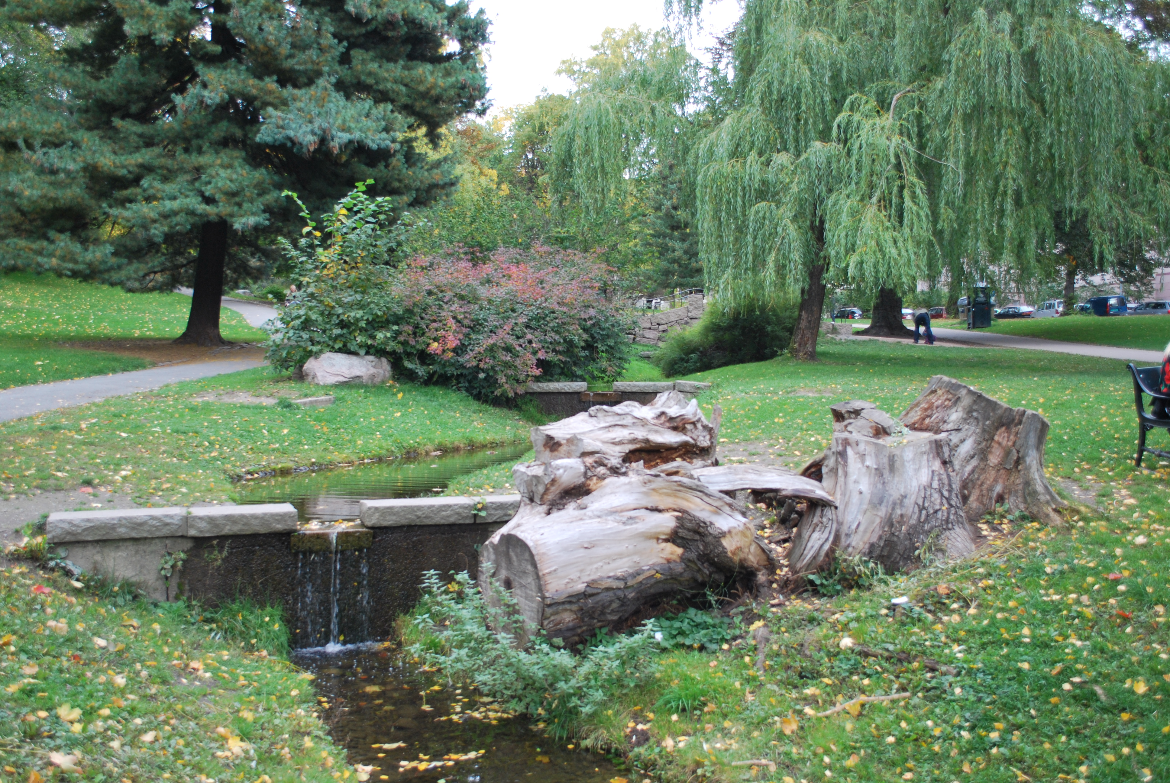 Rot som Friluftsetaten lar bli hvor den er, for å huse insekter og annet småkryp og dermed artsmangfold i parken St. Hanshaugen, Oslo